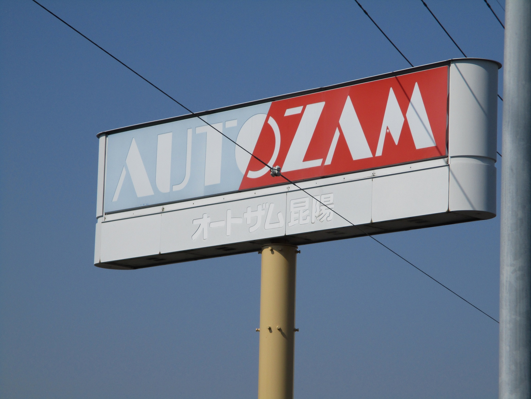 本人による撮影